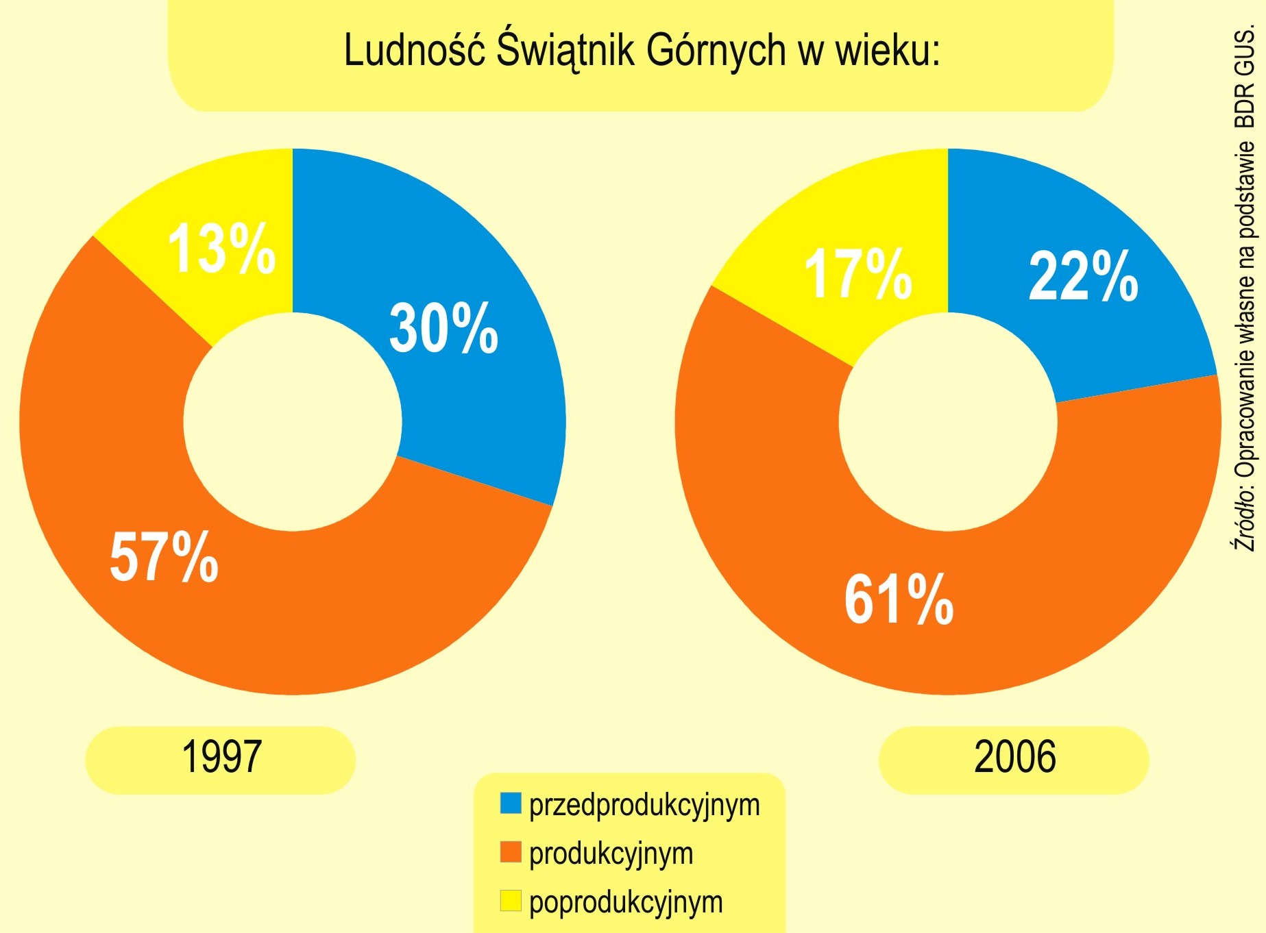 Struktura spoleczno zawodowa